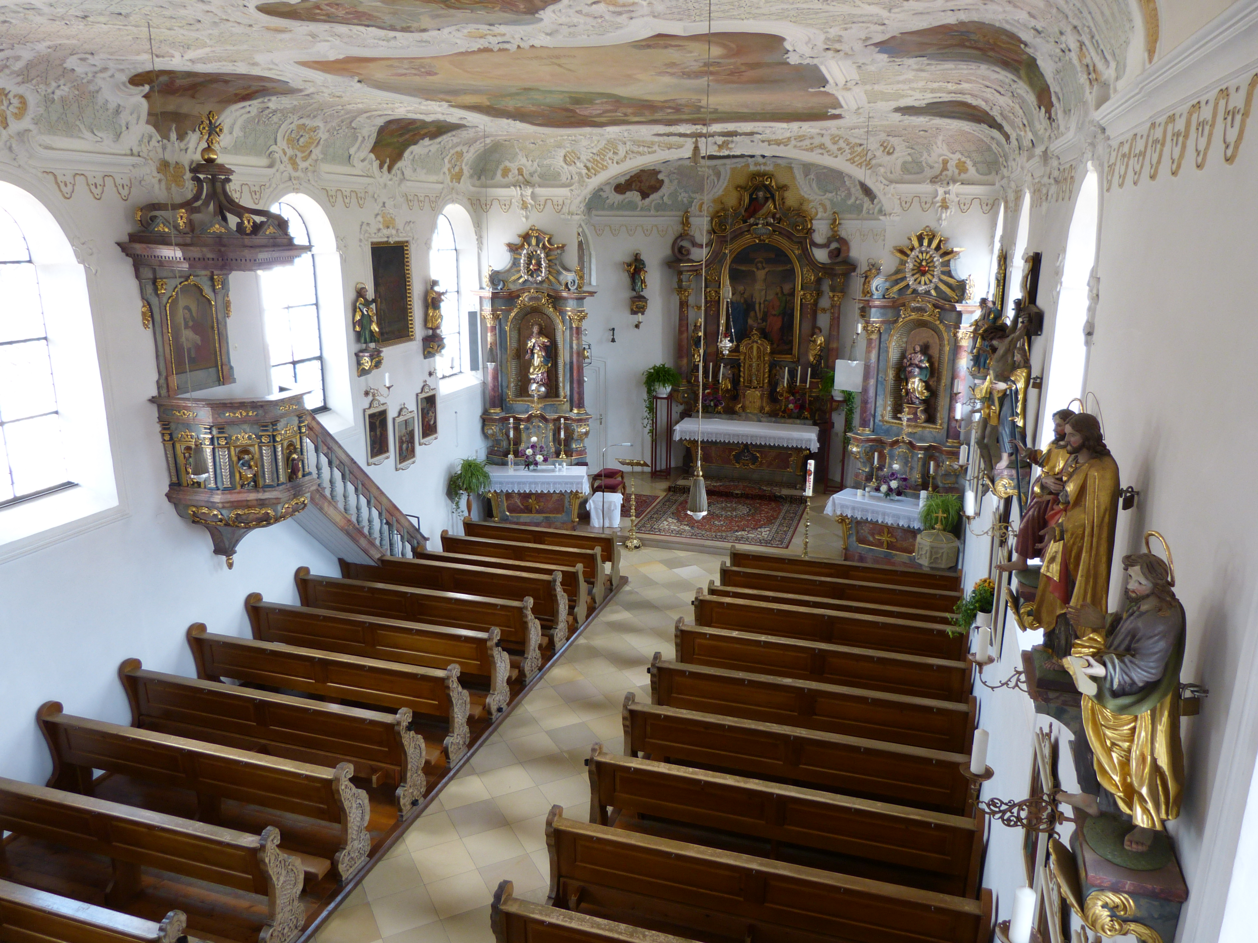 St. Bartholomäus und Hl. Kreuz, Hausen, Landkreis Unterallgäu, Bayern